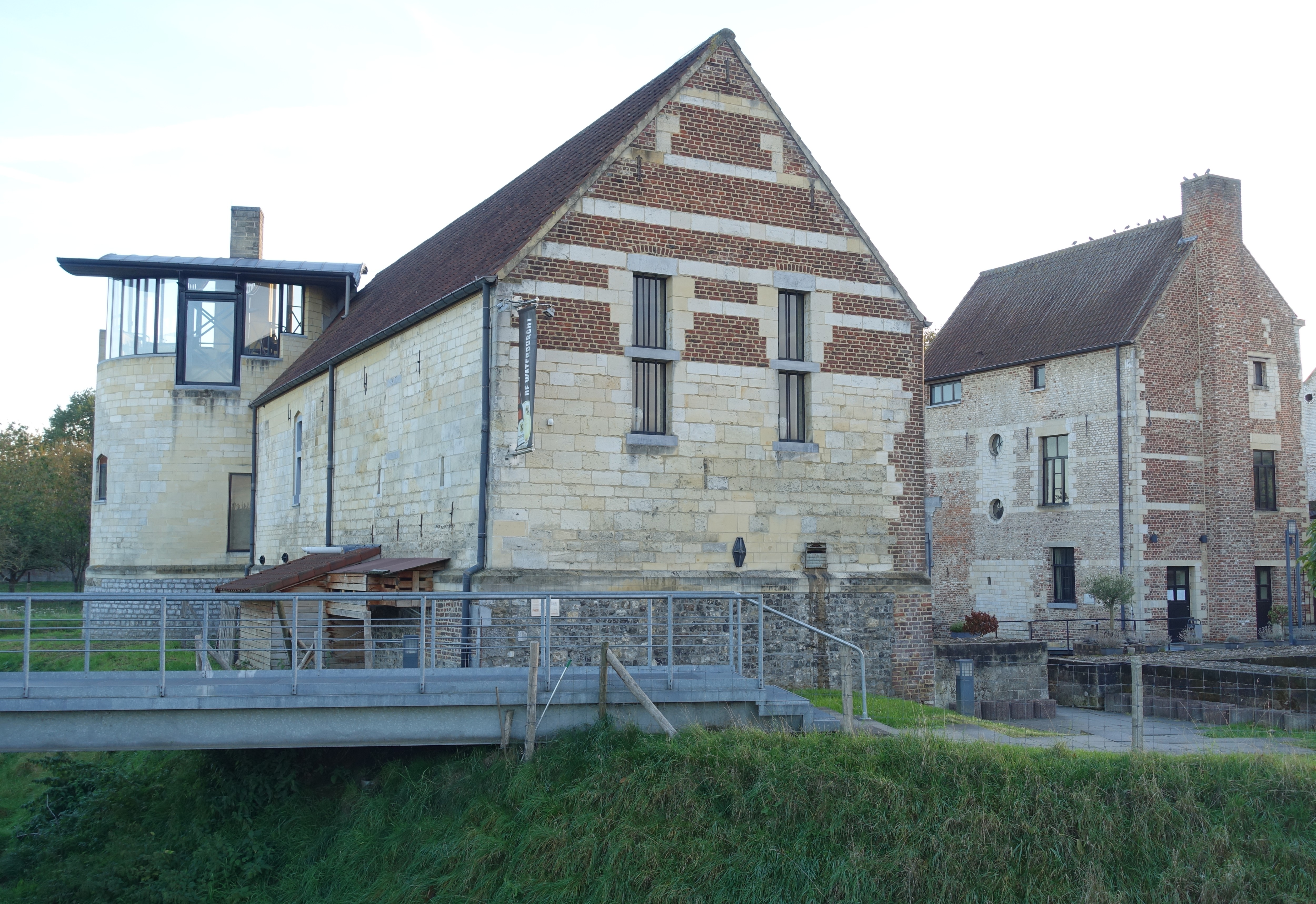 Overblijfselen van vroegere waterburcht, met oorsprong van voor 1366. Beschermd. Erfgoed 36947 This photo of immovable heritage has been taken in the Flemish Region